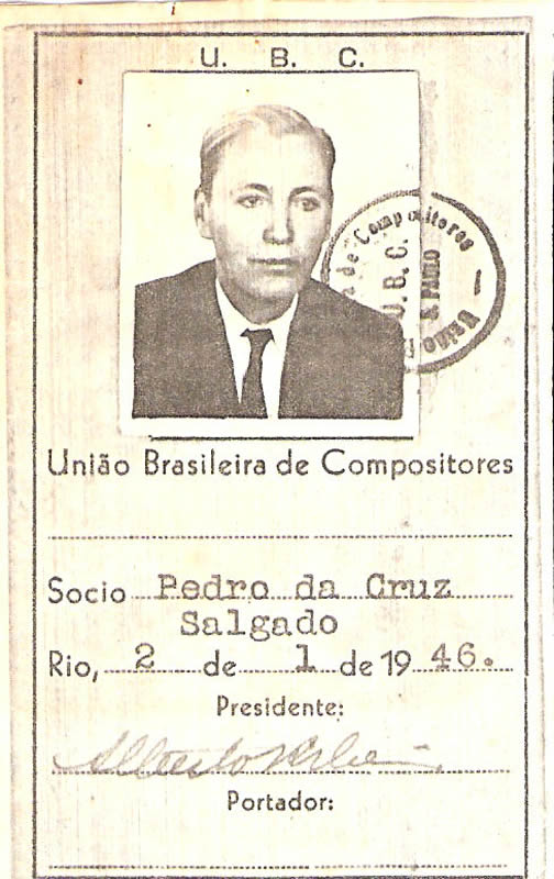 Carteira de registro do compositor Pedro Salgado como sócio da União Brasileira de Compositores, 1946.